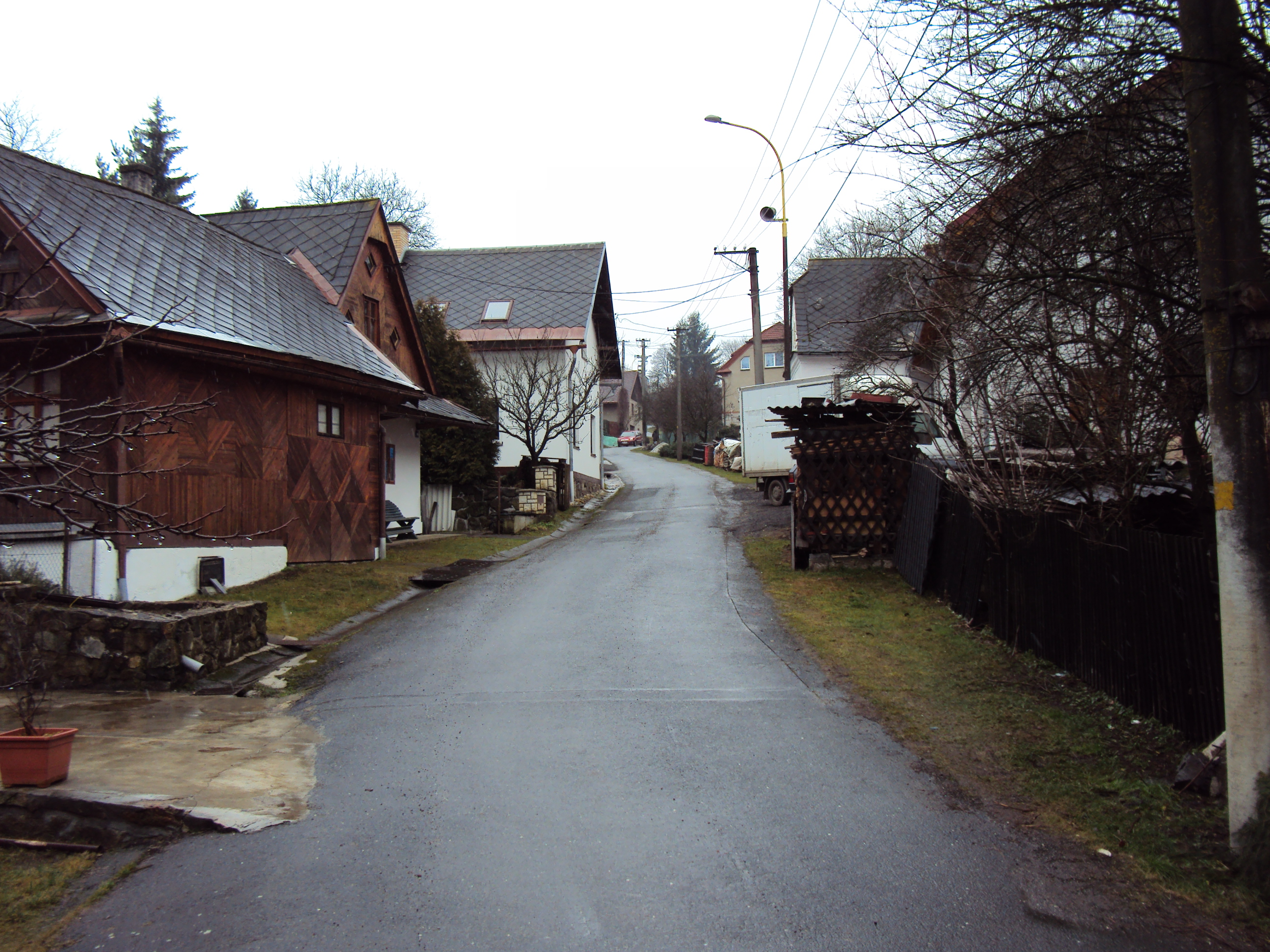 Zborov chalupy